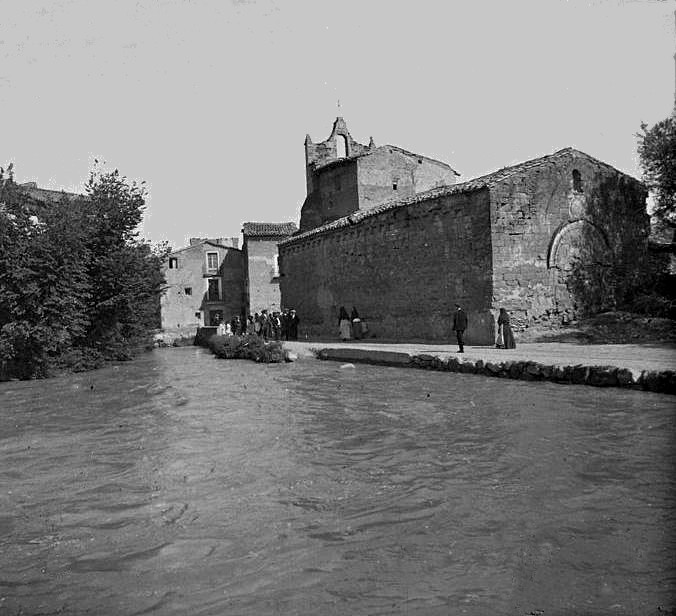 Capella d ' Alfarràs. Josep Salvany i Blanch (1918)